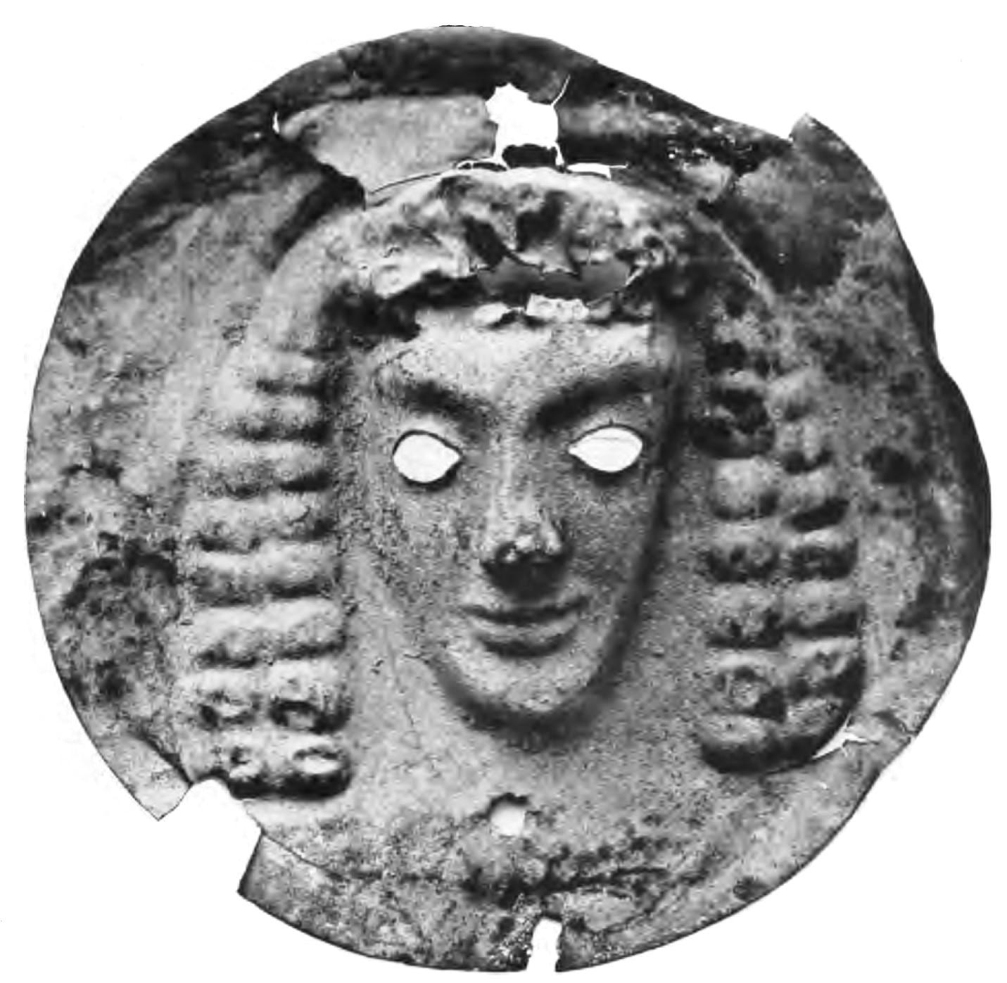 Bronzemaske aus Peloponnes im Berliner Museum